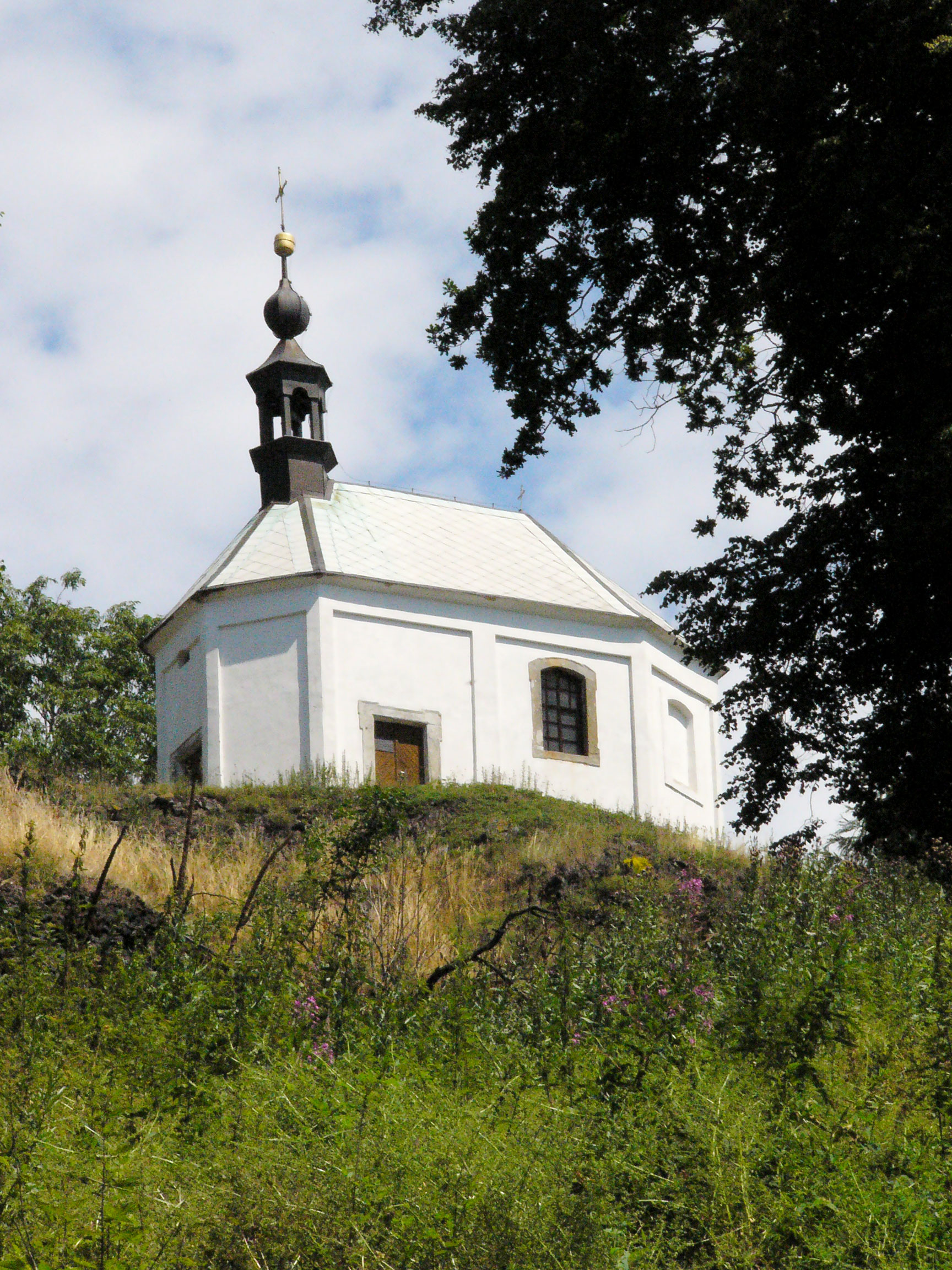 Poutní kaple svaté Anny na vrcholu vrchu Vyskeř od jihozápadu